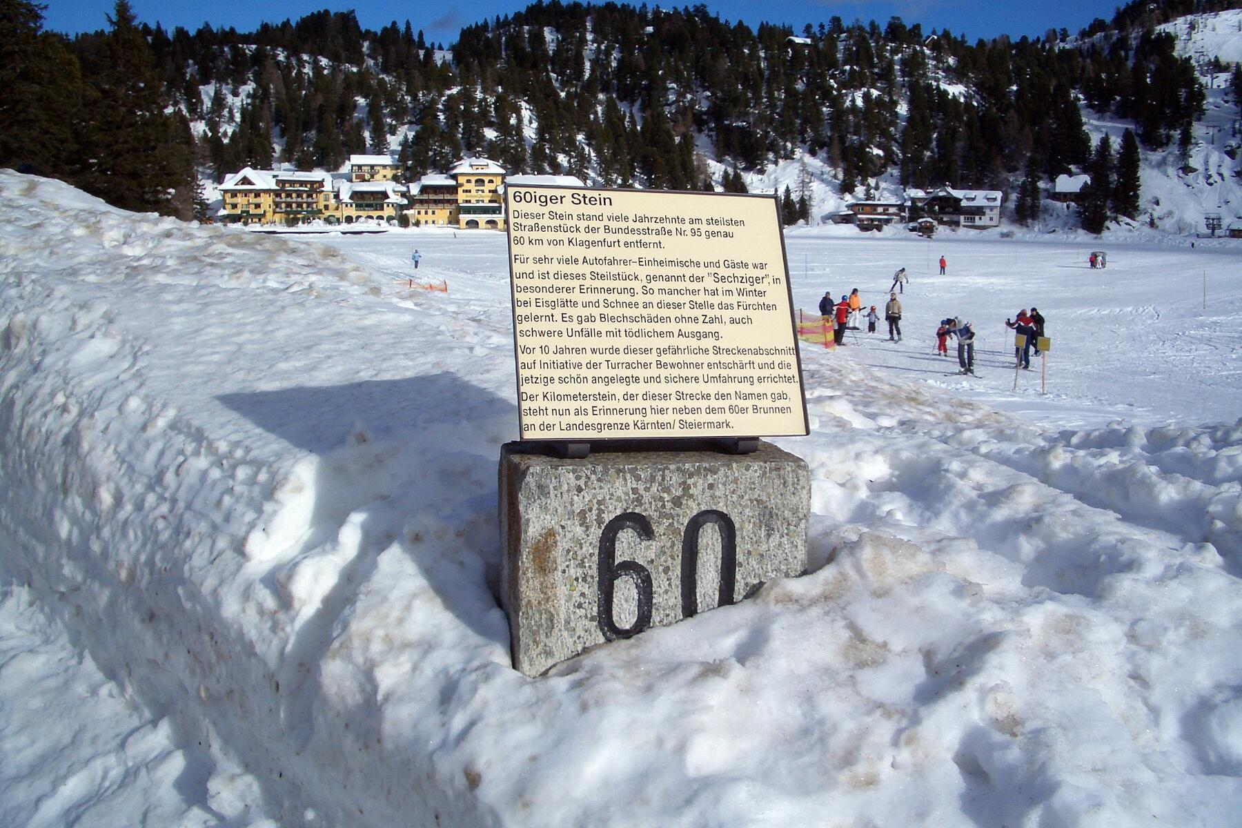 Turracher Höhe: Kilometerstein 60 verstzt in die Ortsmitte zur Erinnerung an die ehemalig steilste Stelle der Südauffahrt